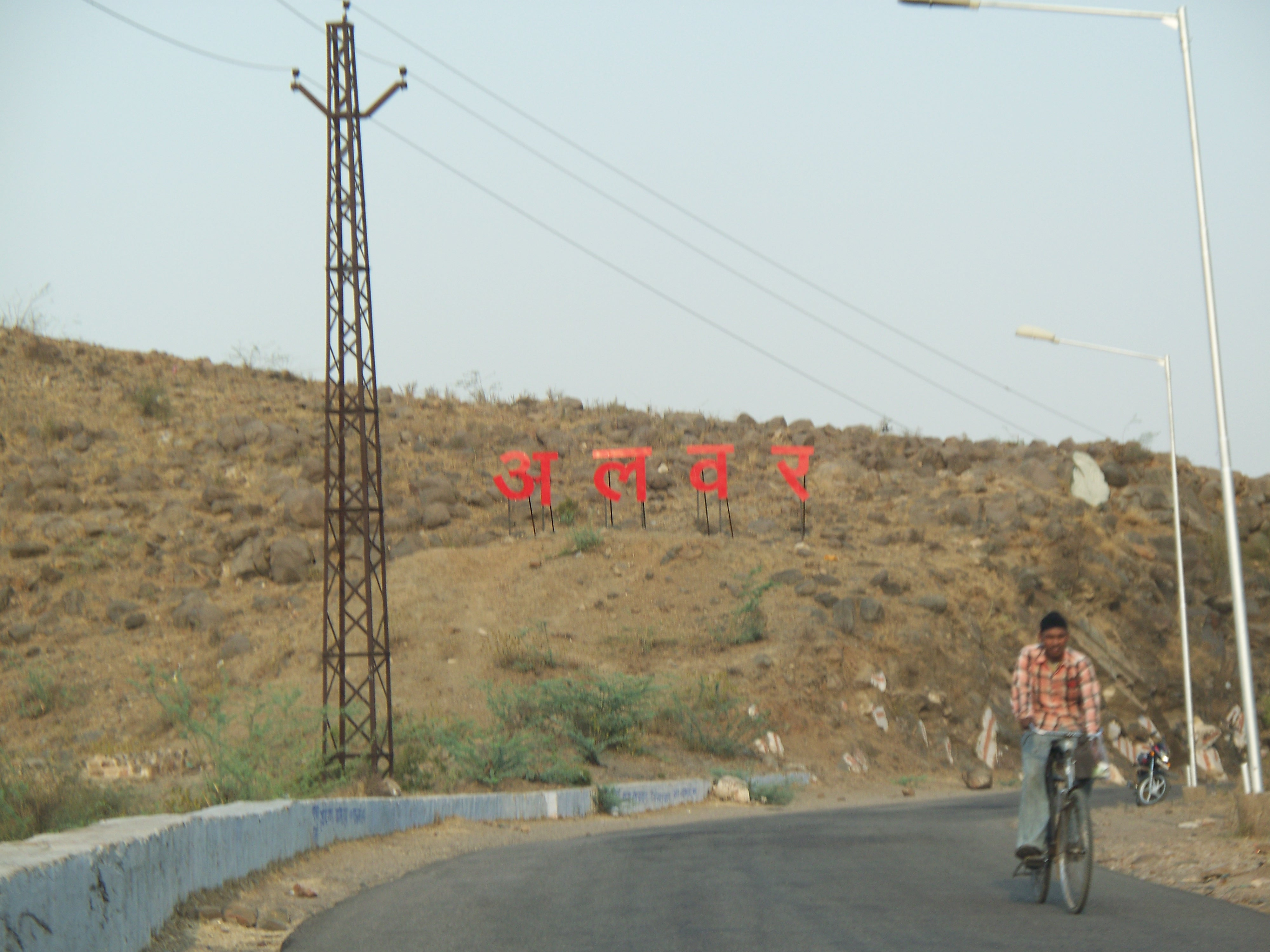 Alwar